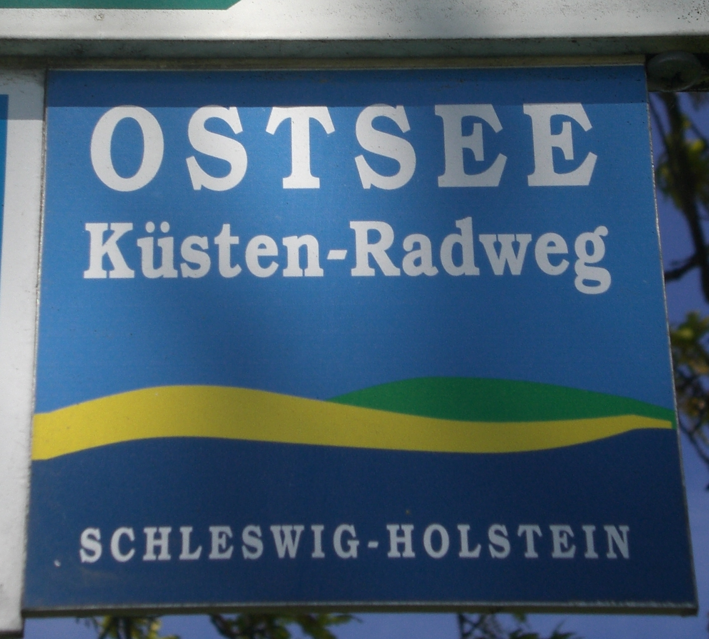 Schild für den Ostee-Küstenradweg.